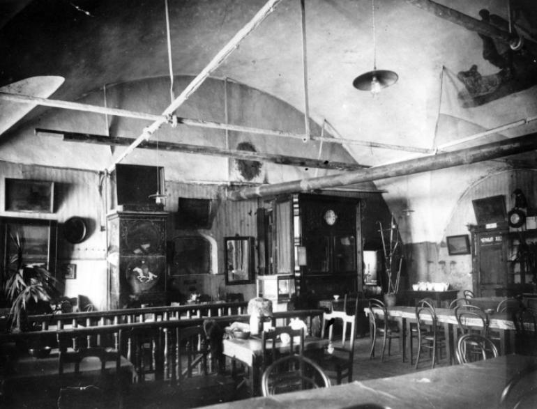 Псковские приказные палаты. Трактир Крым. Дореволюционное фото